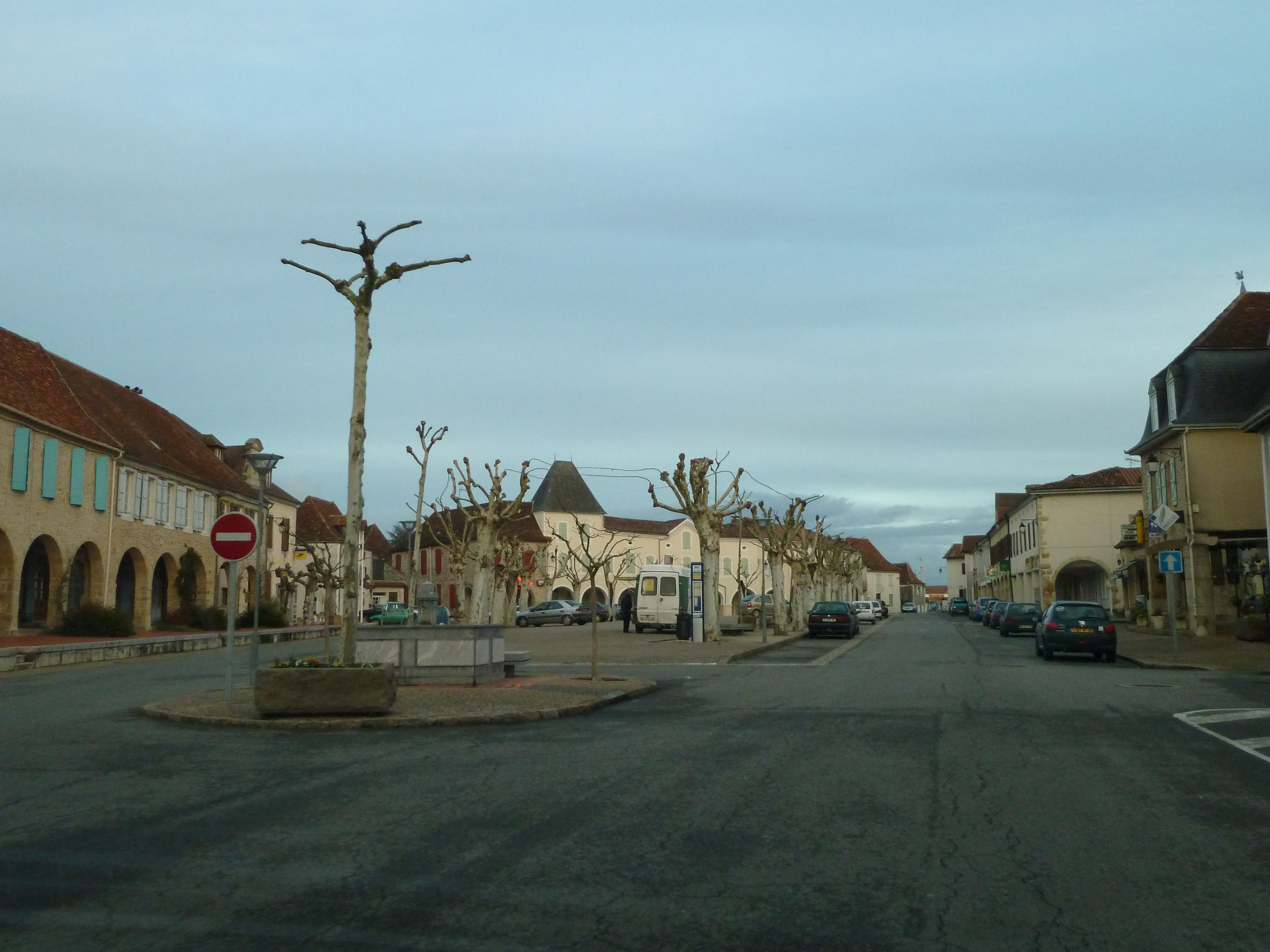 Arzacq-Arraziguet